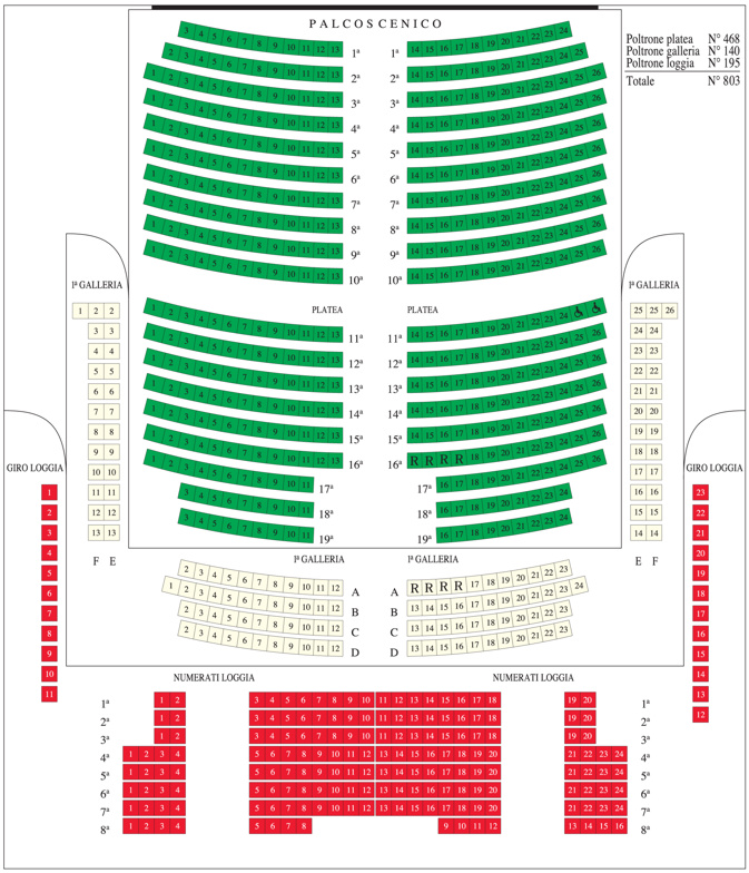 pianta del Teatro Accademia